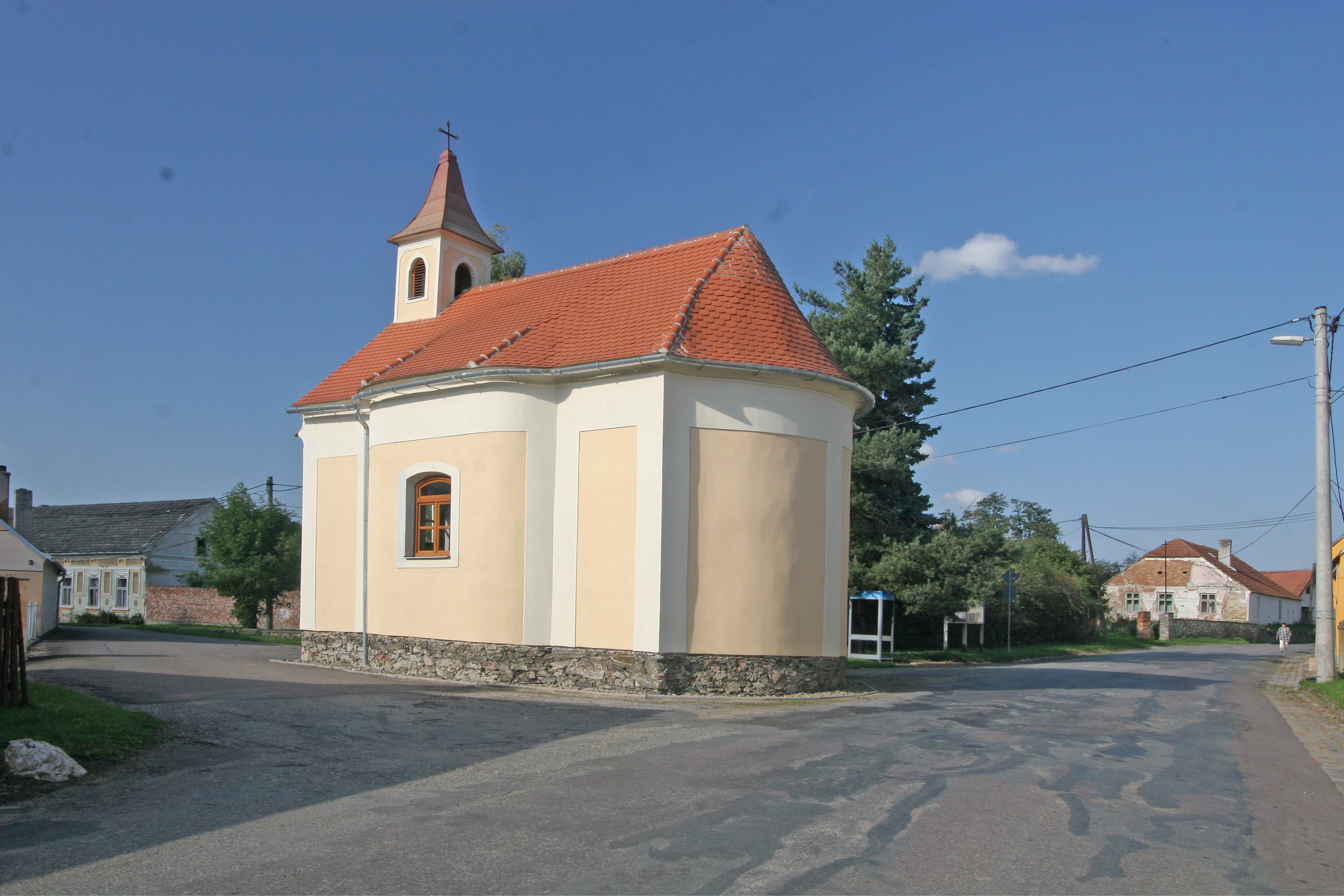 Kaple svatého Michaela Archanděla, Jazovice.